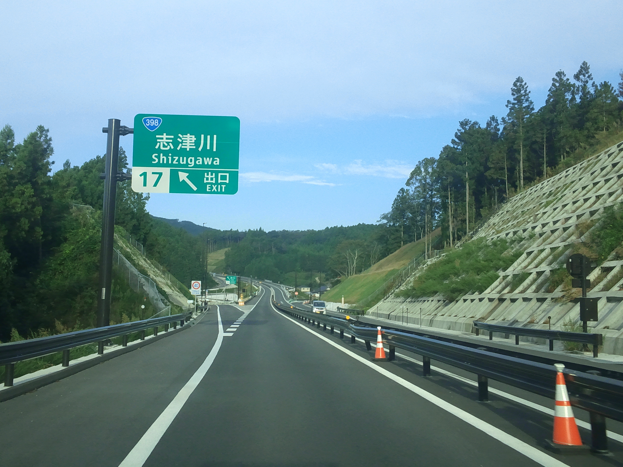 三陸自動車道志津川IC（上り）出口付近